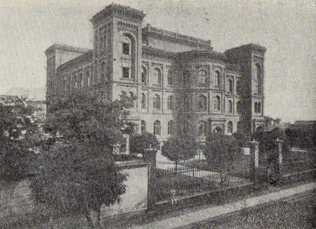 Miejska Szkoła Realna w Poznaniu - fotografia z 1911.